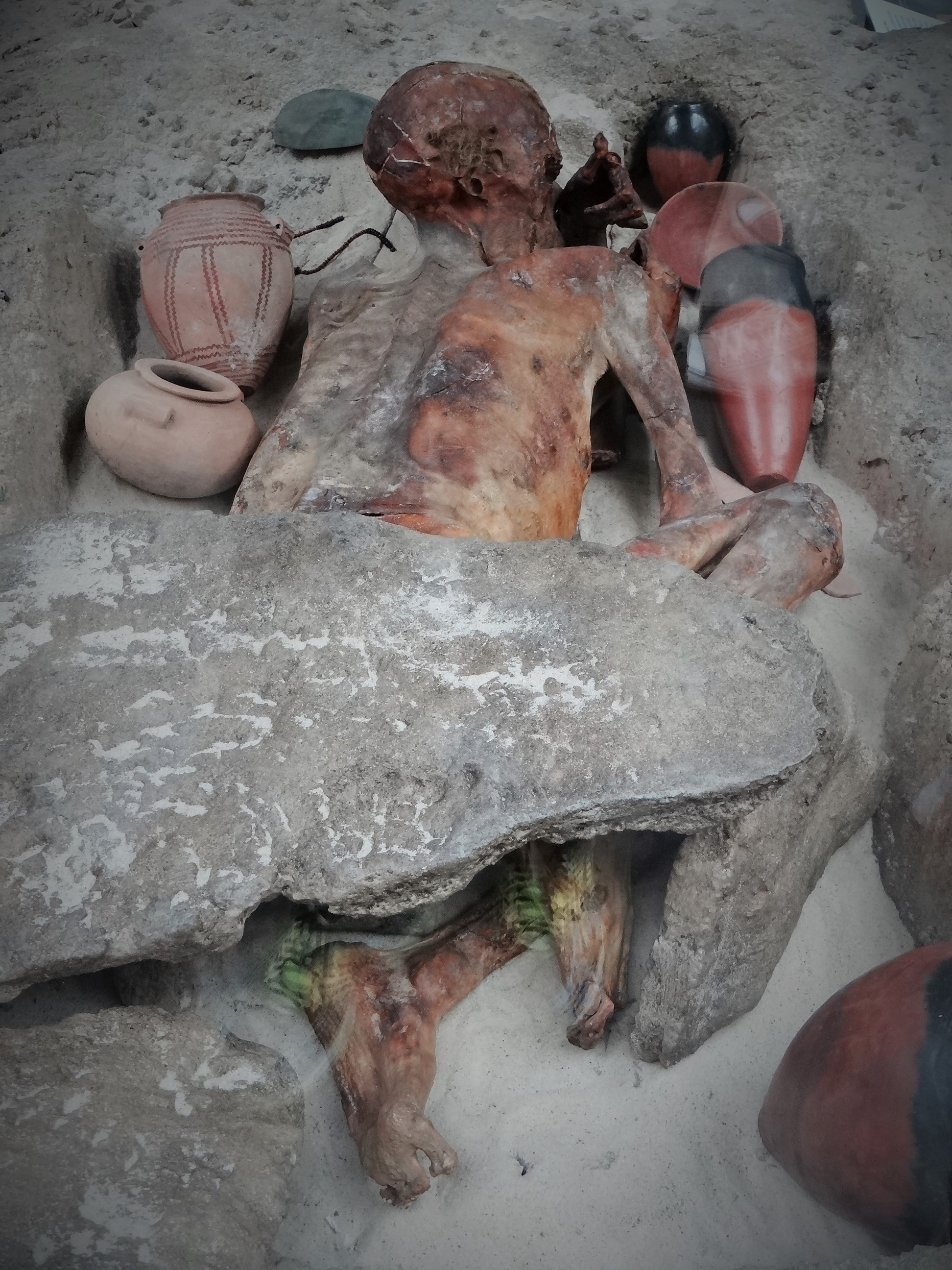 Momie égyptienne au British Museum, Londres